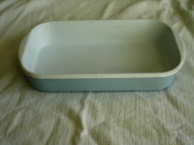 Угаона тепсија.